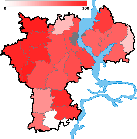 Русские в Ульяновской области